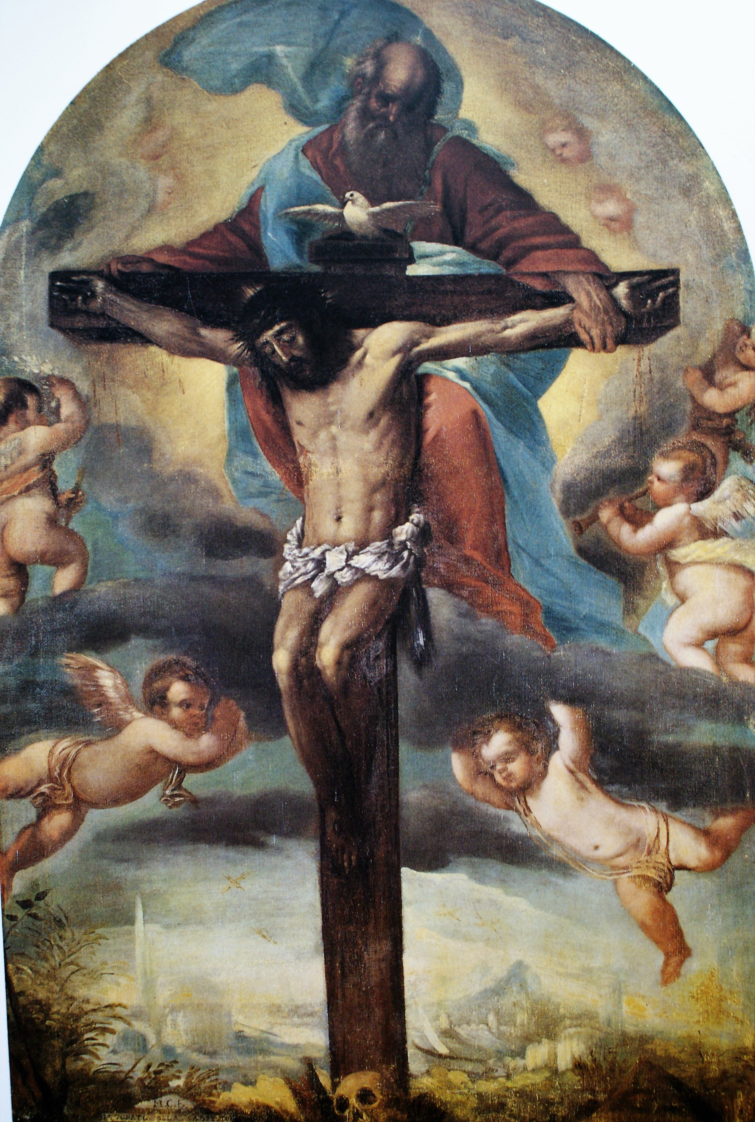 La Santissima Trinità ed angeli - Marziale Carpinoni - Sagrestia della Basilica di Santa Maria Assunta di Clusone